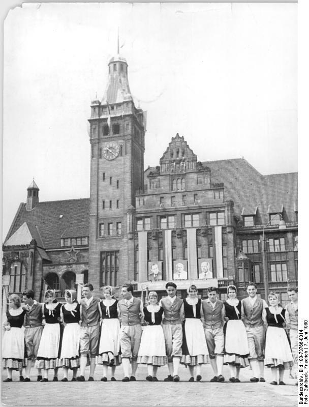 Zentralbild Gahlbeck 7.6.1960 2. Arbeiterfestspiele des FDGB. Stadtbummel durch Karl-Marx-Stadt zu Pfingsten. Auch am Vormittag des Pfingstmontag fanden in allen Festspielorten bunte Veranstaltungen, Platzkonzerte und Massensingen der Chöre statt. Viele Mitglieder der Ensembles benutzten den sonnigen Tag zu einem Bummel durch die Stadt. UBz: Eine Volkskunstgruppe beim Stadtbummel. Im Hintergrund das Rathaus von Karl-Marx-Stadt.